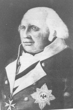 Georg-Henning von Puttkamer (1721–1814), Generalleutnant